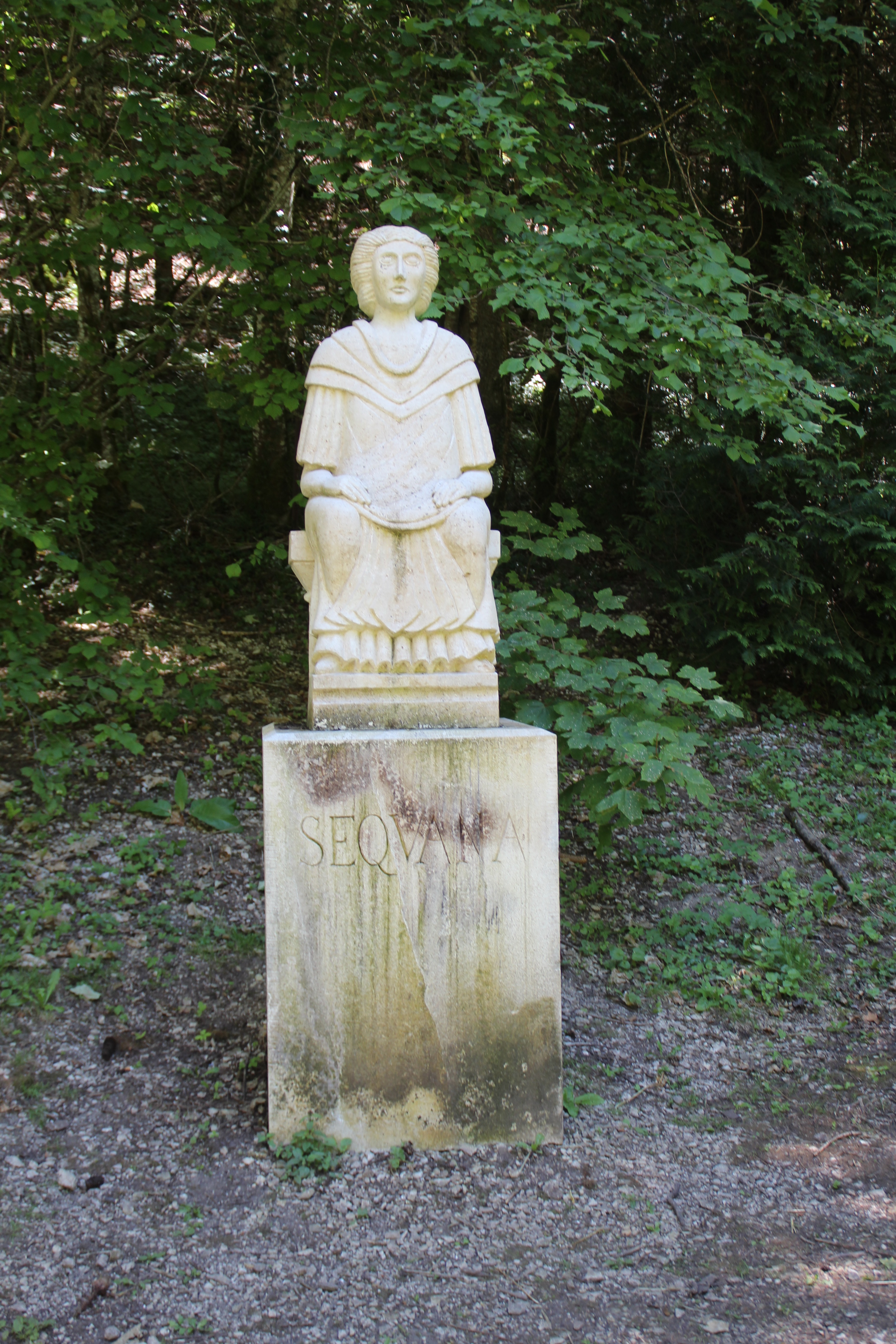 Sequanastatue an der Seinequelle in Source-Seine